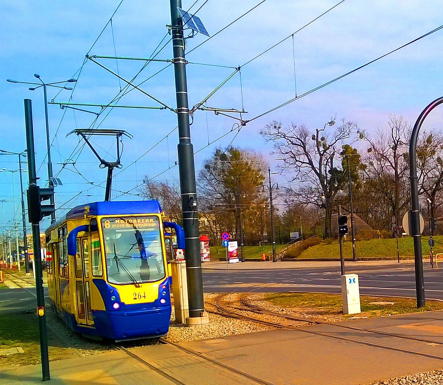 Plac NOT w Toruniu, 2017